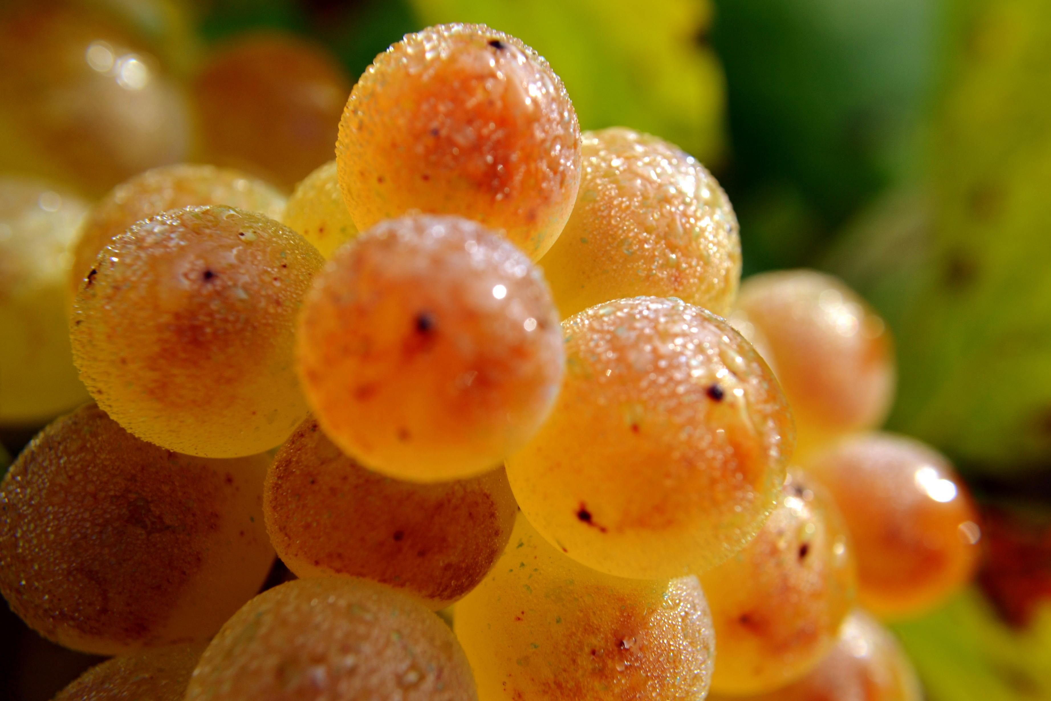 Raïm varietat Parellada del Penedes amb gotes de rosada del matí, una delicatesen.